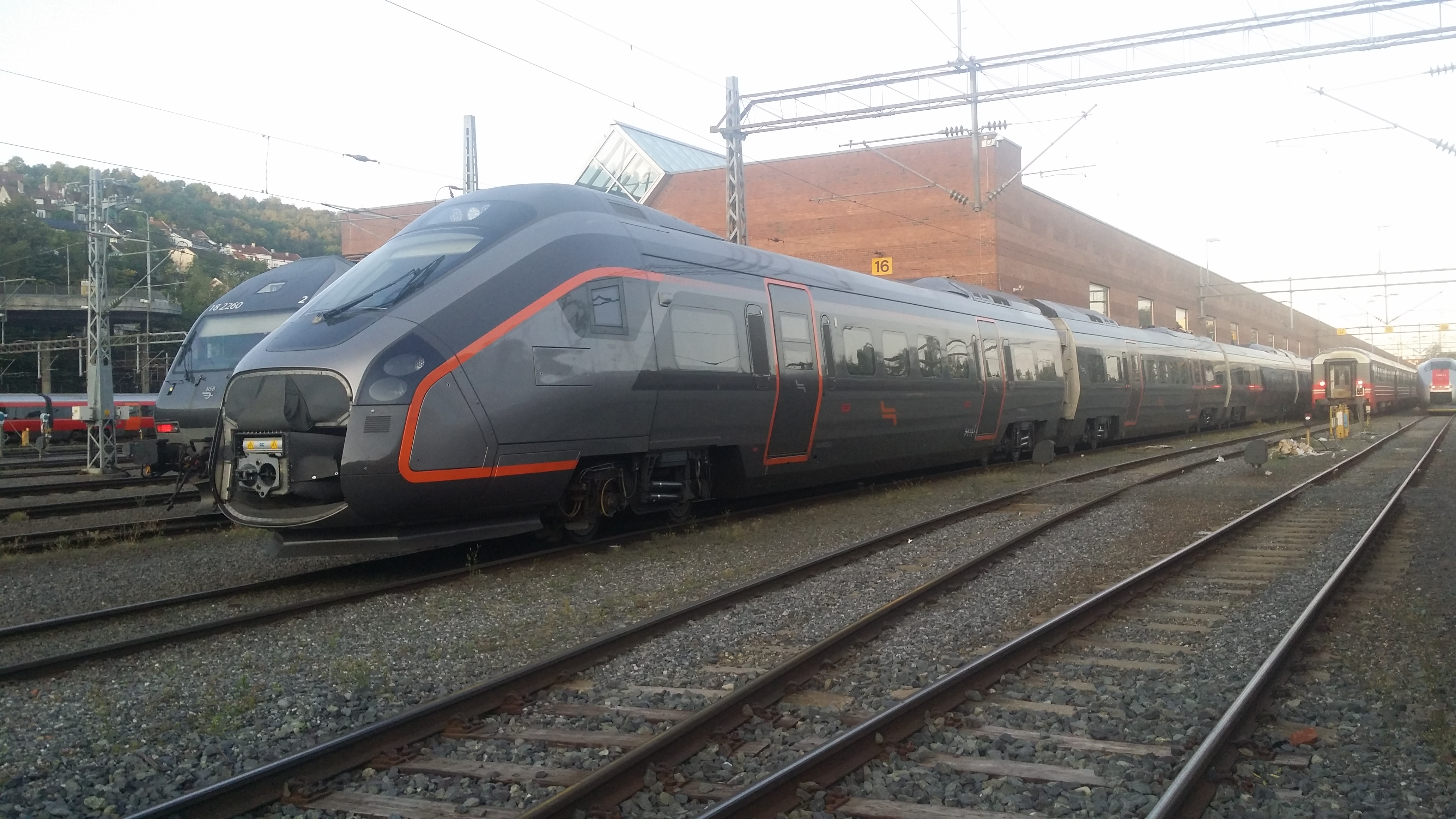 Nytt flytog tp. 78 i Lodalen.